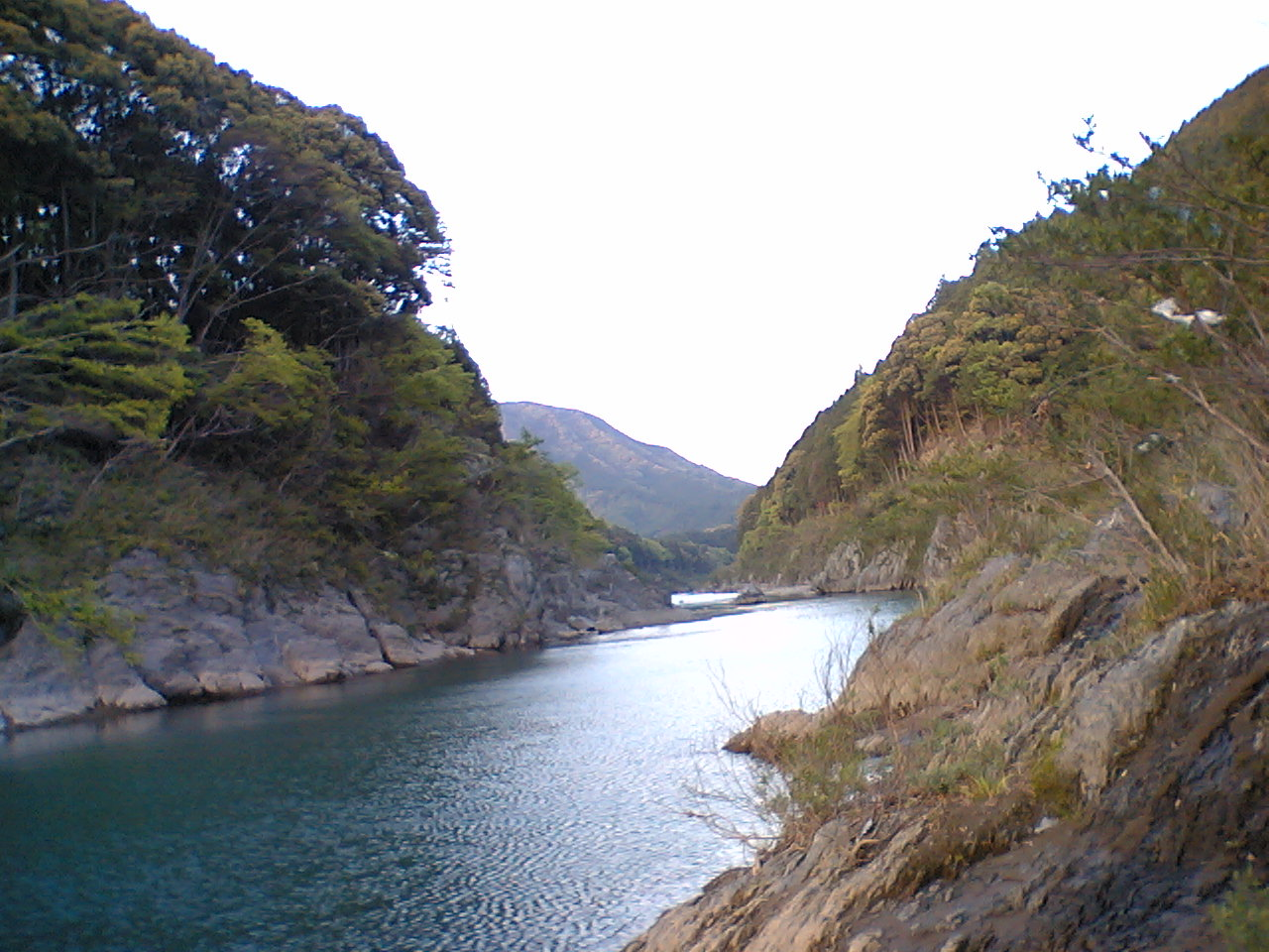 Miya River